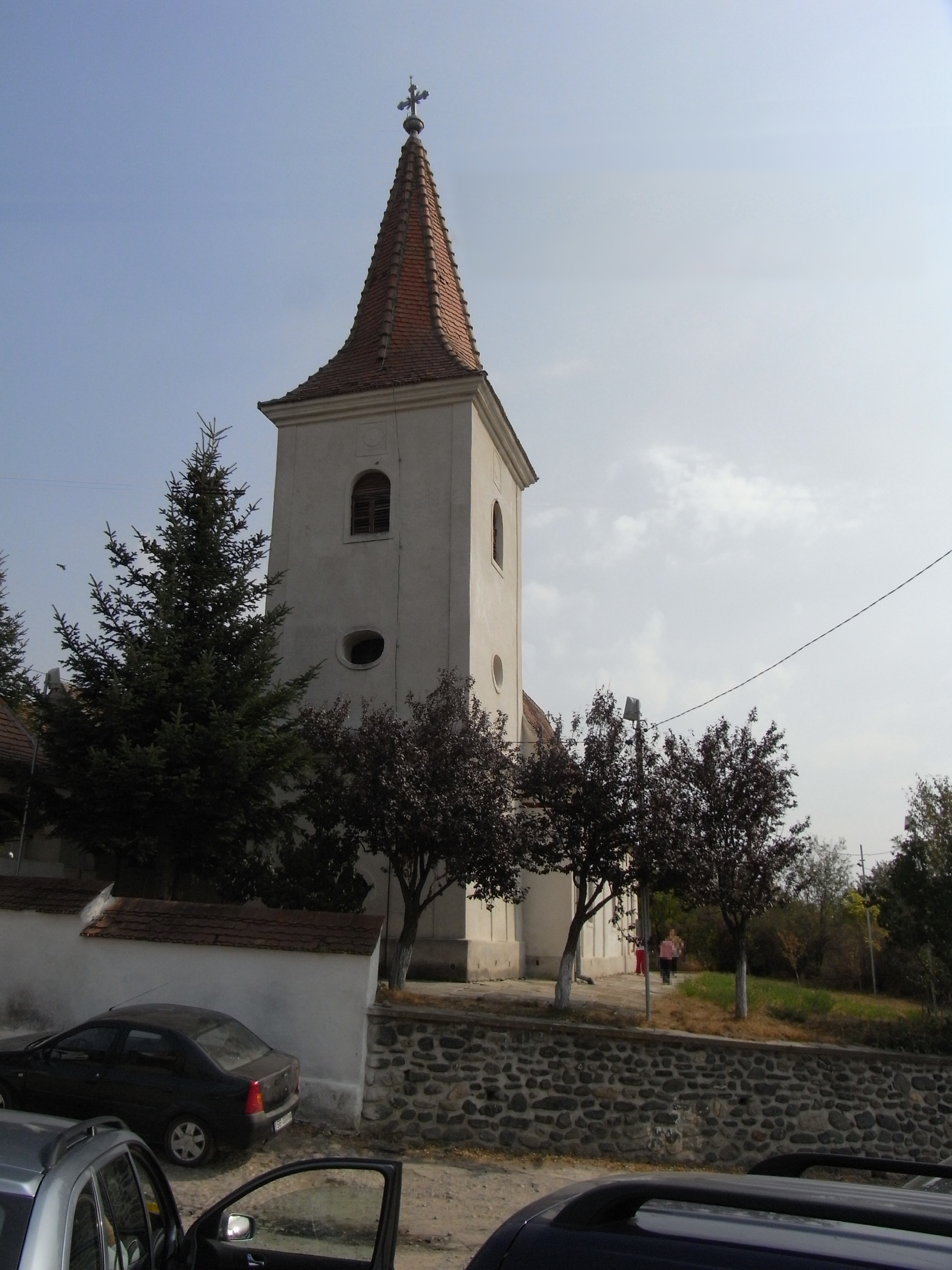 Orthodoxe Kirche von Salzburg (RO)